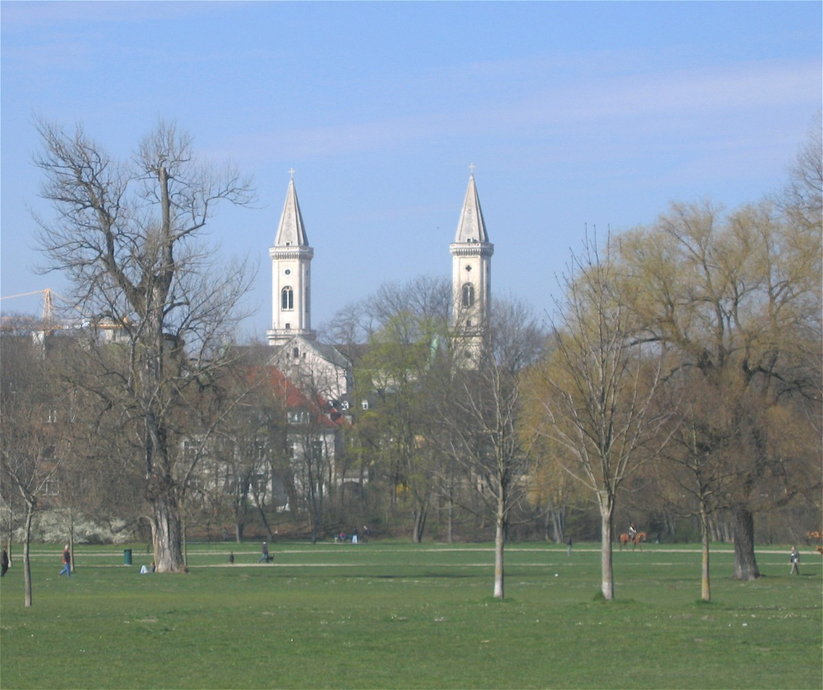 St. Ludwig, München, vom Englischen Garten gesehen